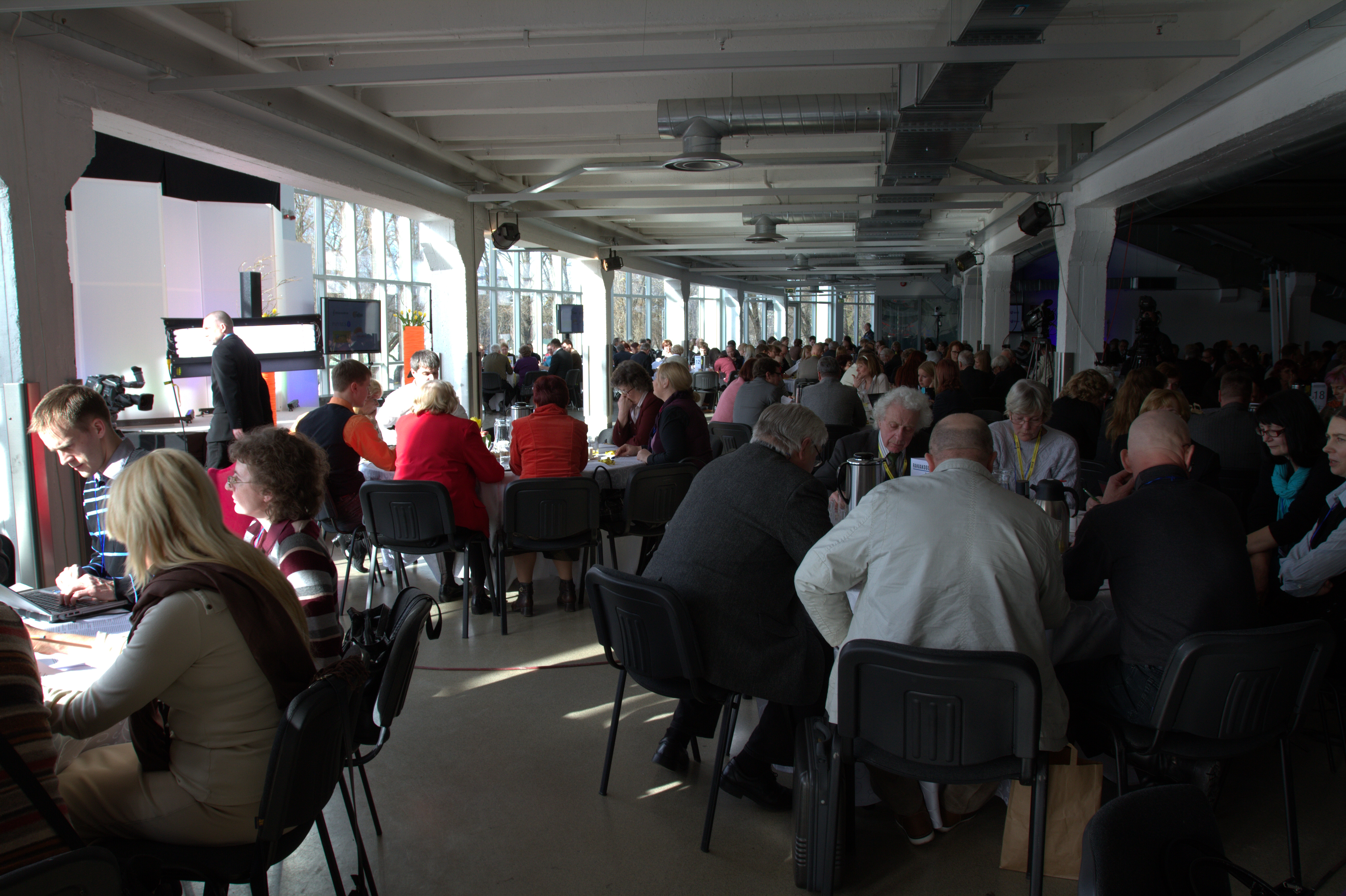 Rahvakogu arutelupäev 6. aprillil 2013 Tallinna lauluväljakul.